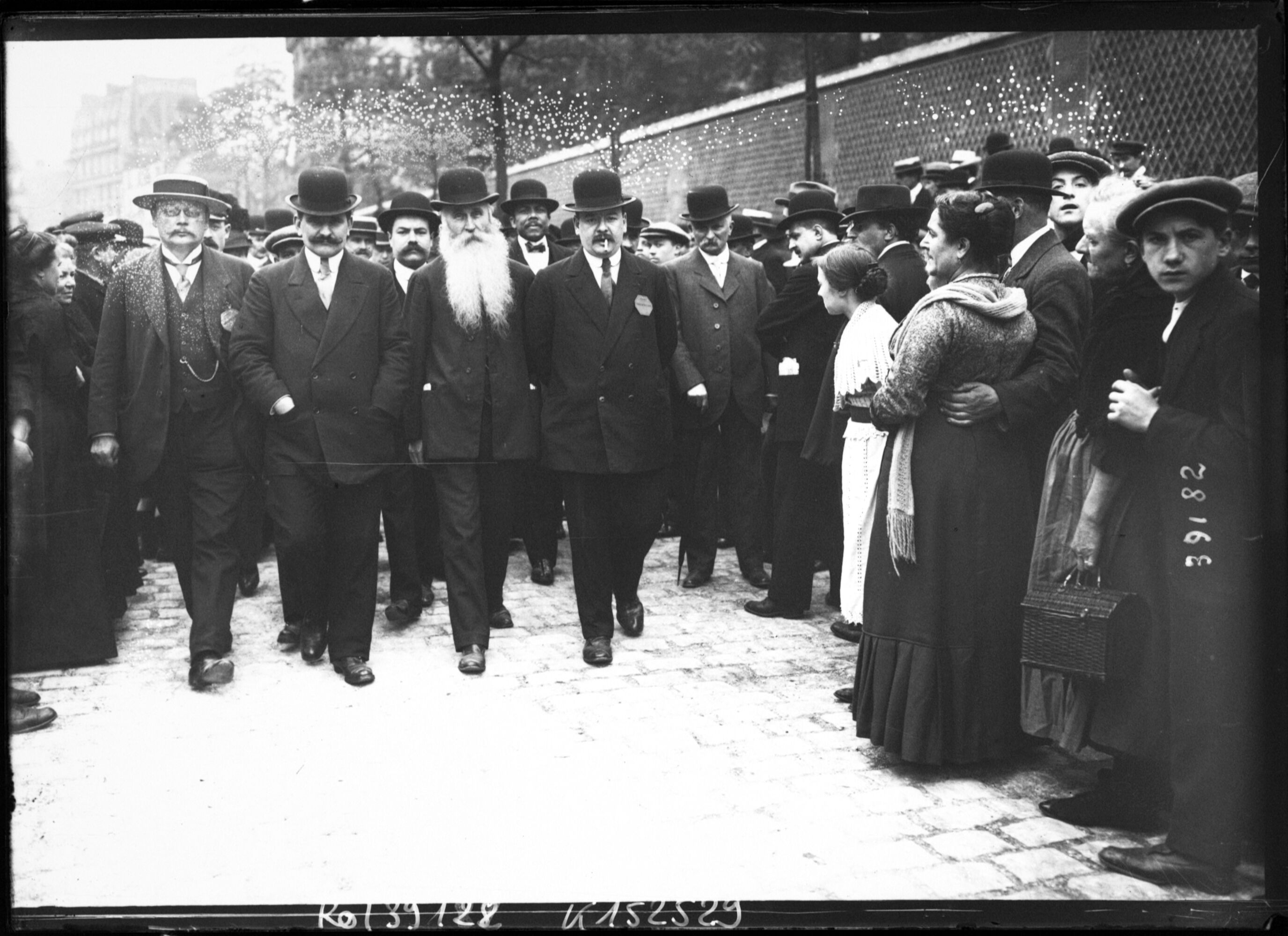 Arthur Groussier (1863-1957), syndicaliste, franc-maçon et député de Paris, (avec la barbe) lors d'une manifestation au cimetière du Père-Lachaise le 24 mai 1914